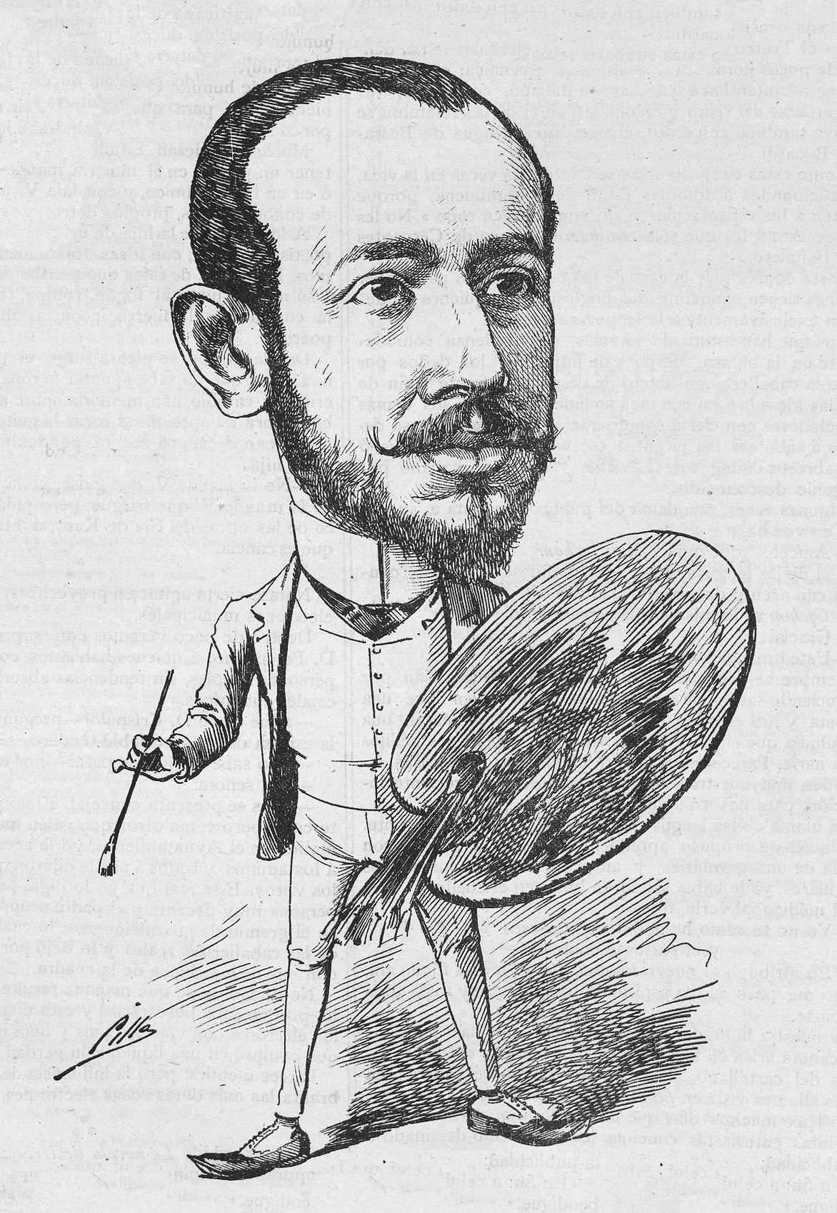 Madrid Cómico, 16 de abril de 1887.